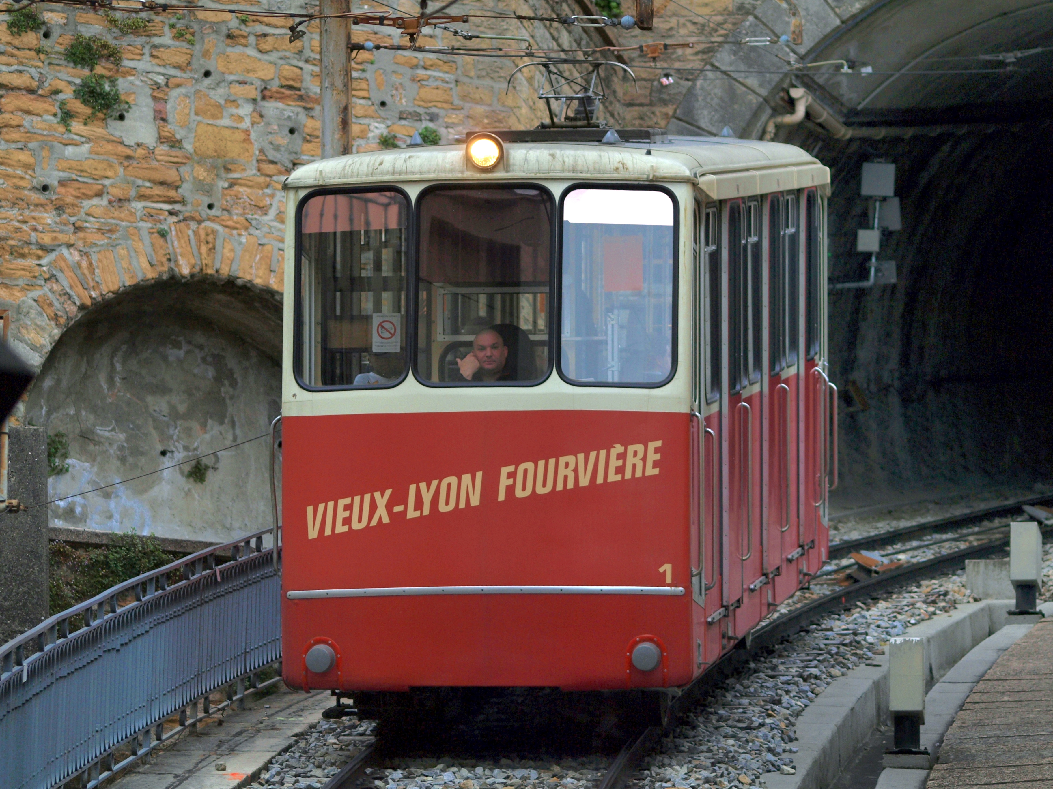 Vieux-Lyon Fourvière